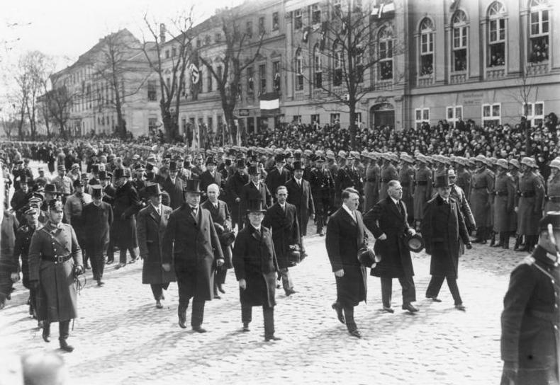 Die historische Reichstags-Eröffnung in der Garnisonkirche in Potsdam! Reichskanzler Adolf Hitler an der Spitze der Reichsregierung neben ihm Vizekanzler von Papen dahinter Minister Dr. Goebbels schreiten das Spalier der Reichswehr vor der Garnisonkirche in Potsdam ab.